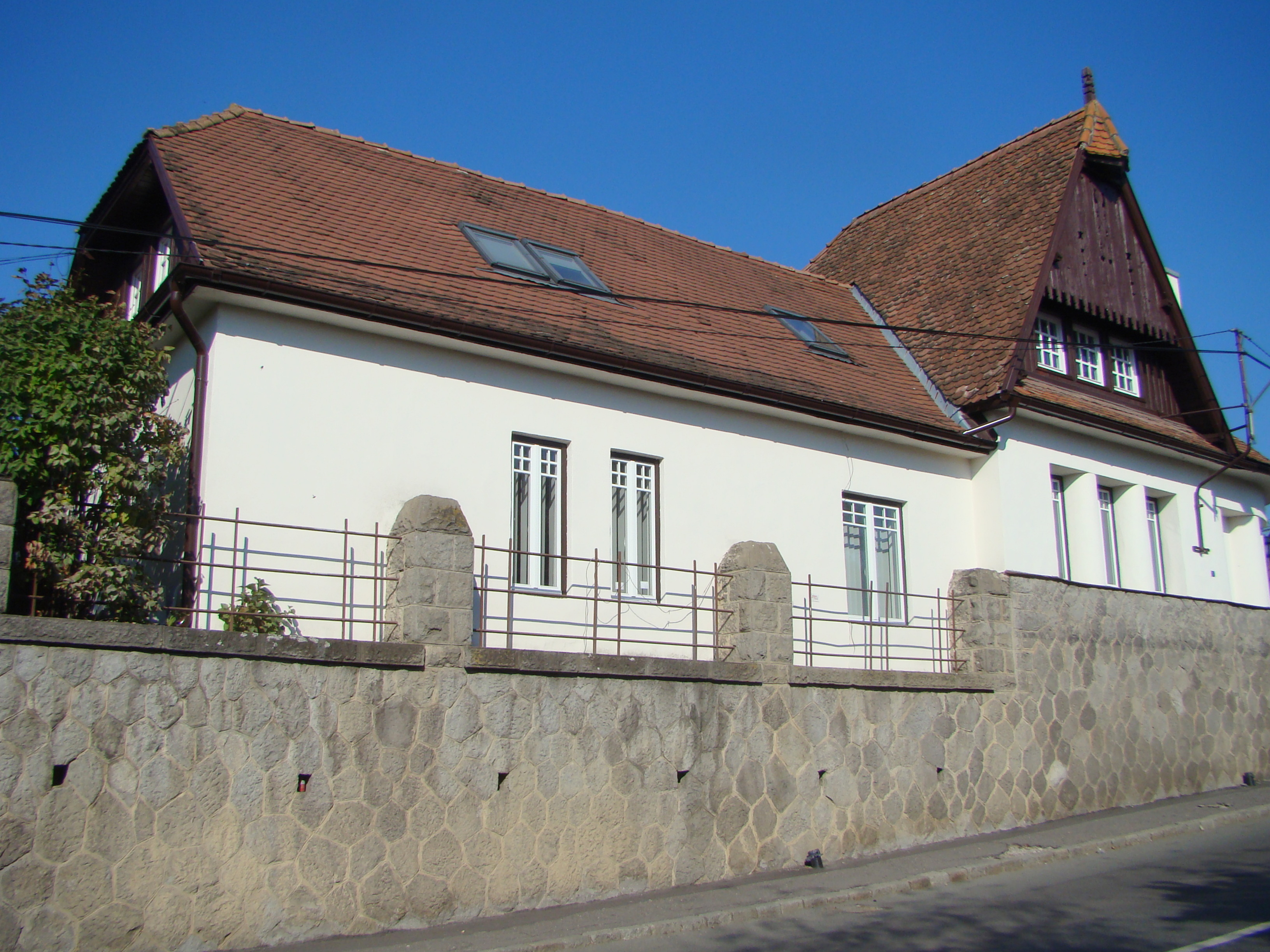 Fostul ansamblu al administrației Uzinelor Comunale, azi R. A. Aquaserv și S.C. Energomur S.A., municipiul Târgu Mureș Str. Kos Karoly 1A și 1 B 1910 - 1913